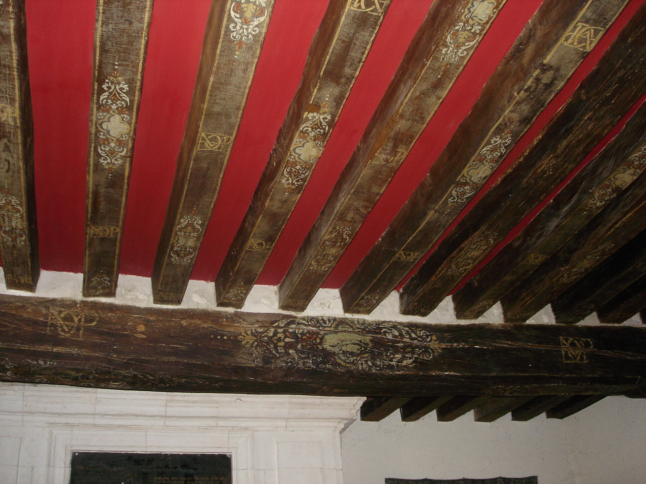 Photo des proutres peites du salon de La Mabiliere, avec ses signatures mystérieuses DMDP